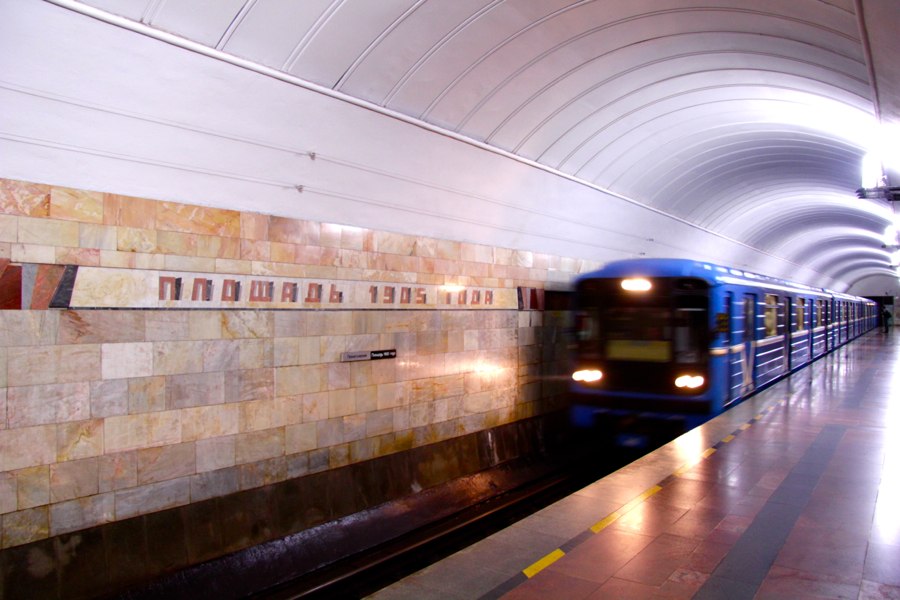 Yekaterinburg Metro (Екатеринбургский метрополитен)